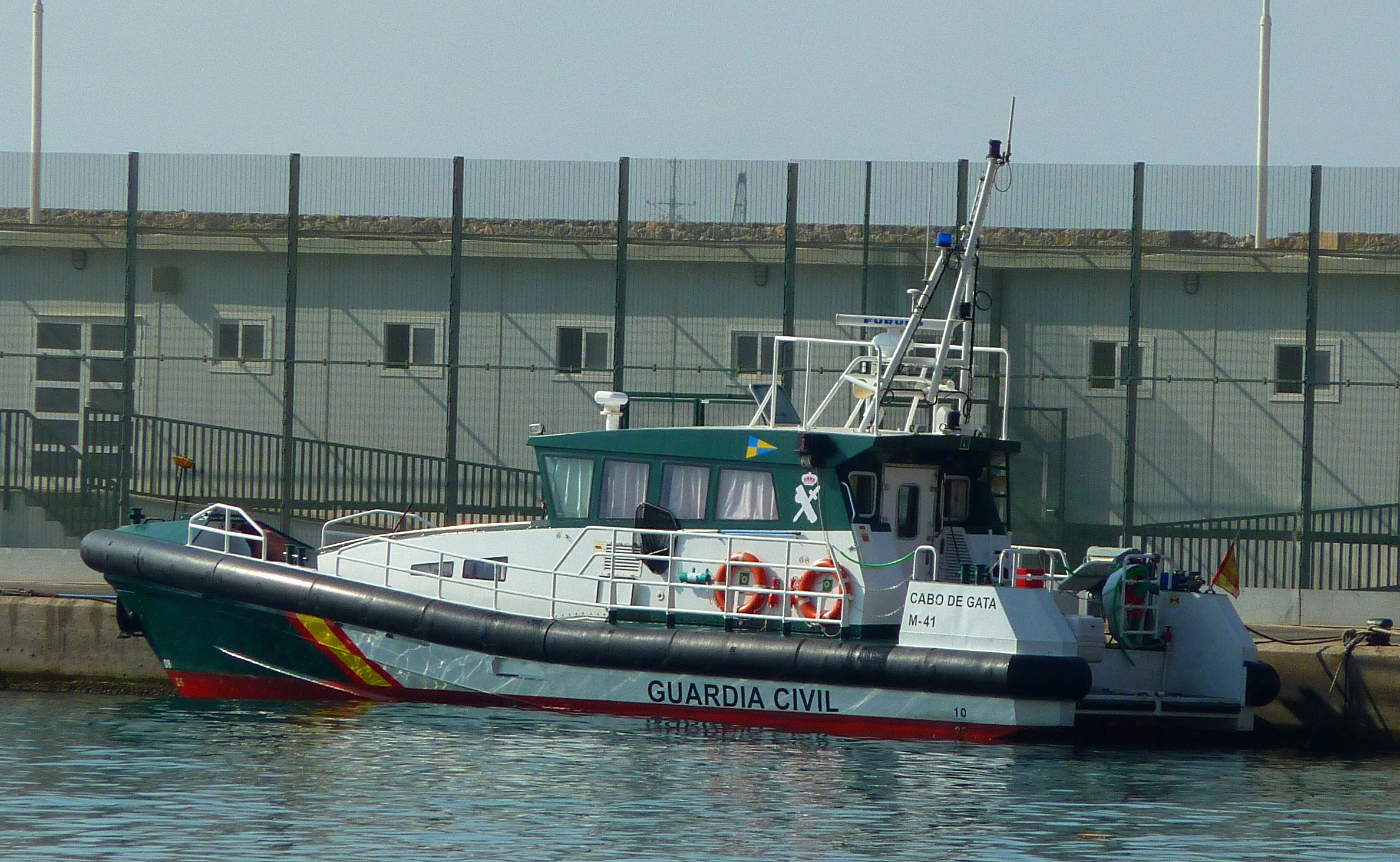 Patrullera "Cabo de Gata" del Servicio Marítimo de la Guardia Civil.